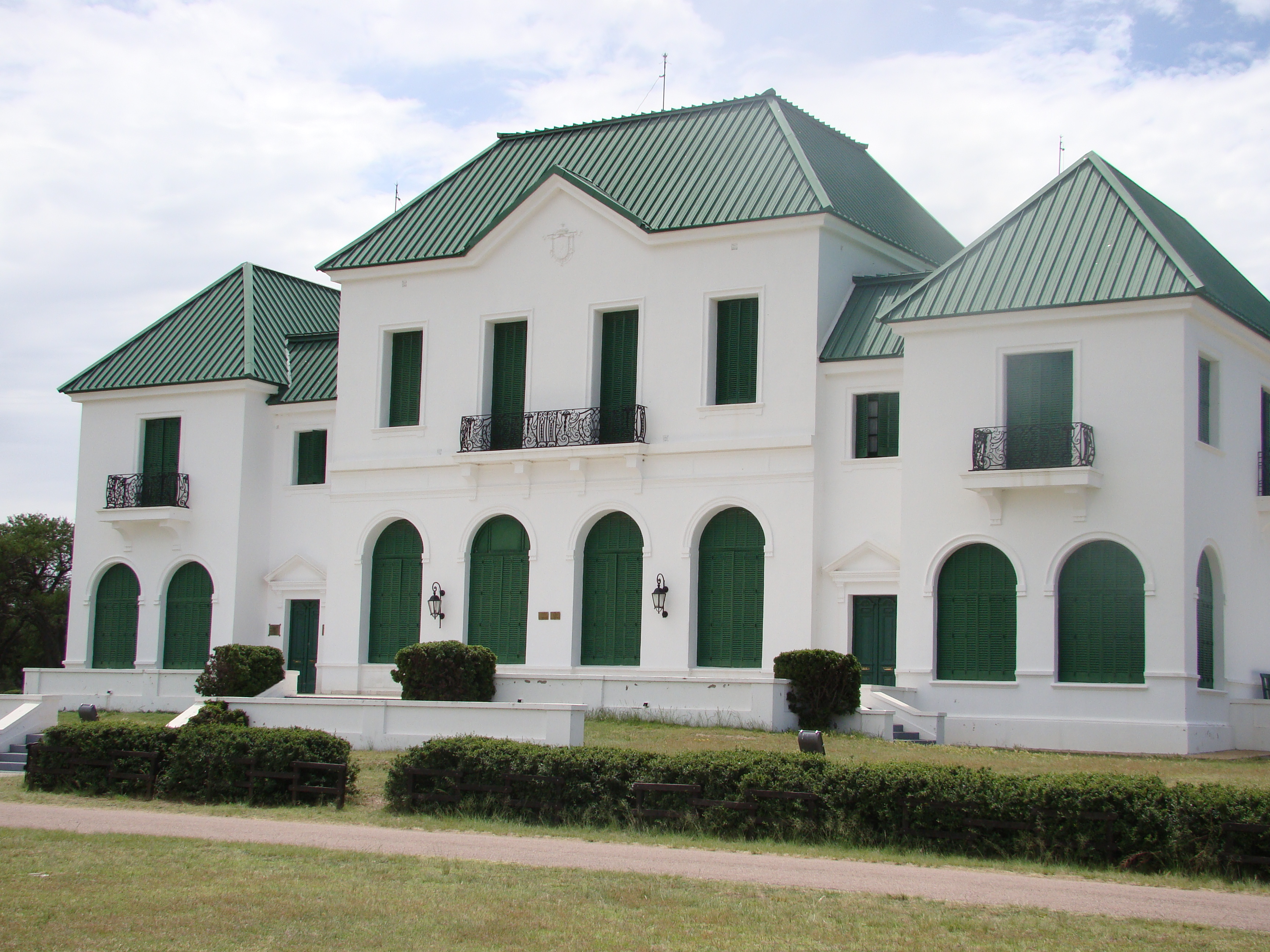 Santa Rosa , La Pampa (Argentina)